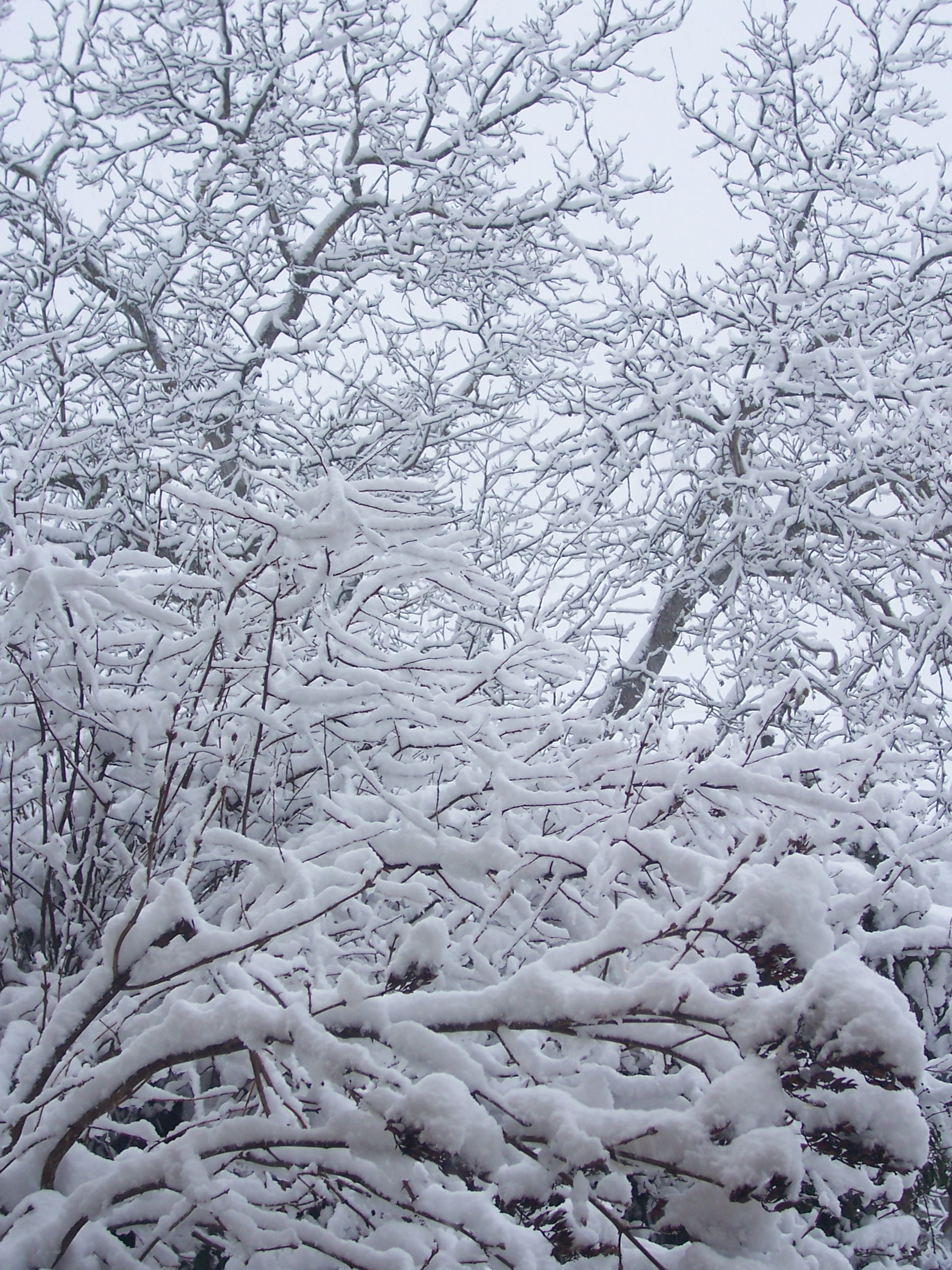 Il neige à Beaumont